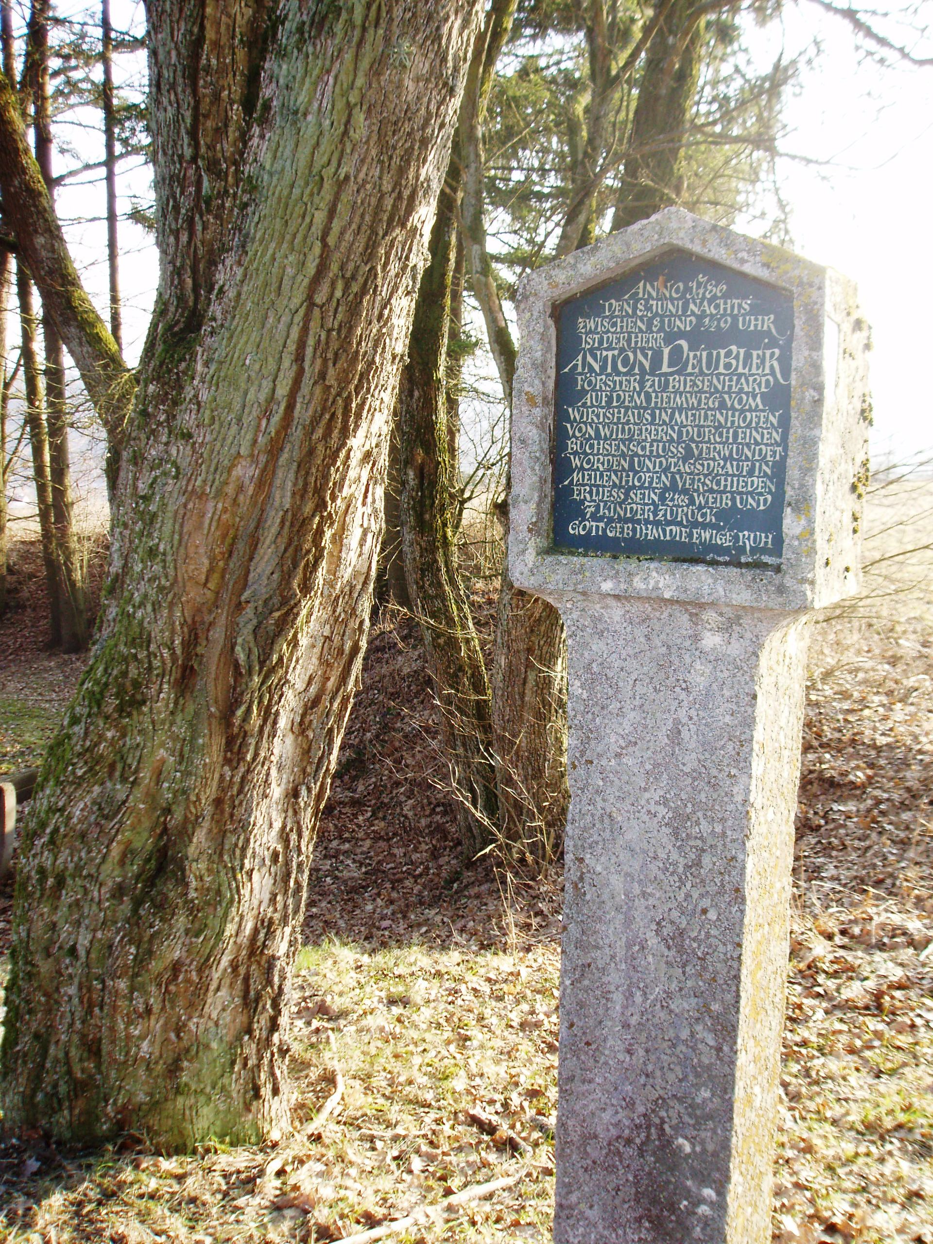 Marterl bei Meilenhofen im Landkreis Eichstätt.Inschrift: Anno 1786 den 8. Juni nachts zwischen 8 und 1/2 9 Uhr ist der Herr ANTON DEUBLER Förster zu Biesenhard auf dem Heimweg vom Wirtshaus in Meilenhofen von Wilderern durch einen Büchsenschuss verwundet worden und tagsdrauf in Meilenhofen verschieden. Er liess sein 2tes Weib und 7 Kinder zurück. Gott geb ihm die ewige Ruh